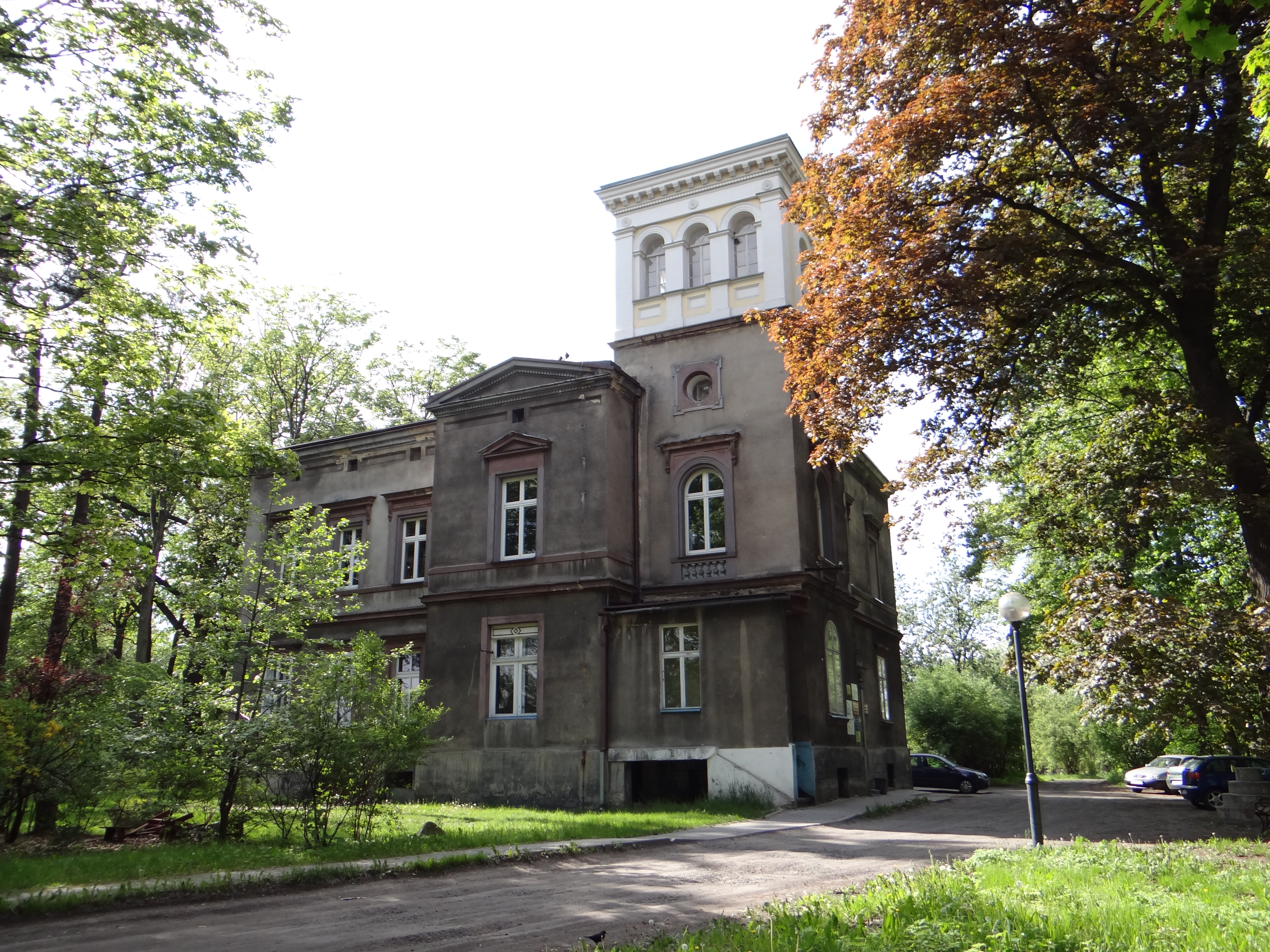 fasada pałacu w Leszczynach (gmina Czerwionka-Leszczyny)